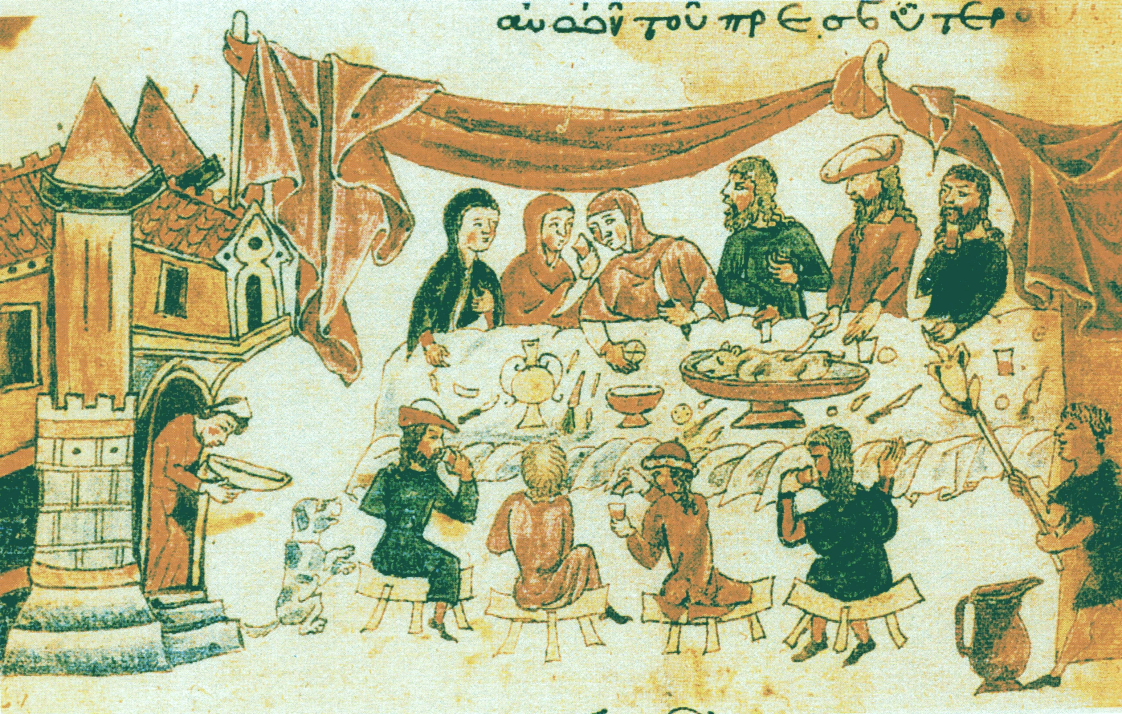 BNF MS Grec 135, fol. 18v, Festin des enfants de Job